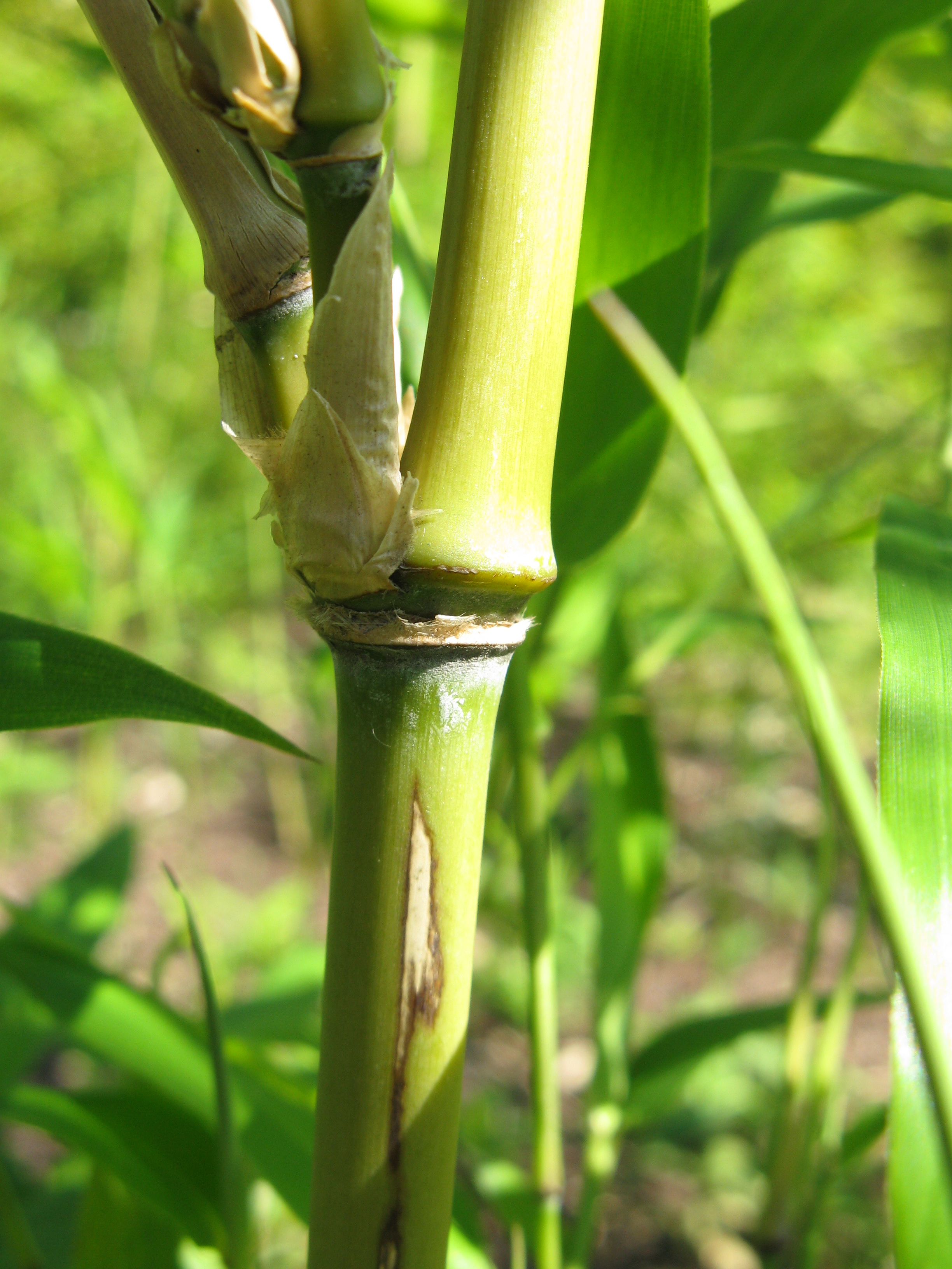 Sinobambusa tootsik